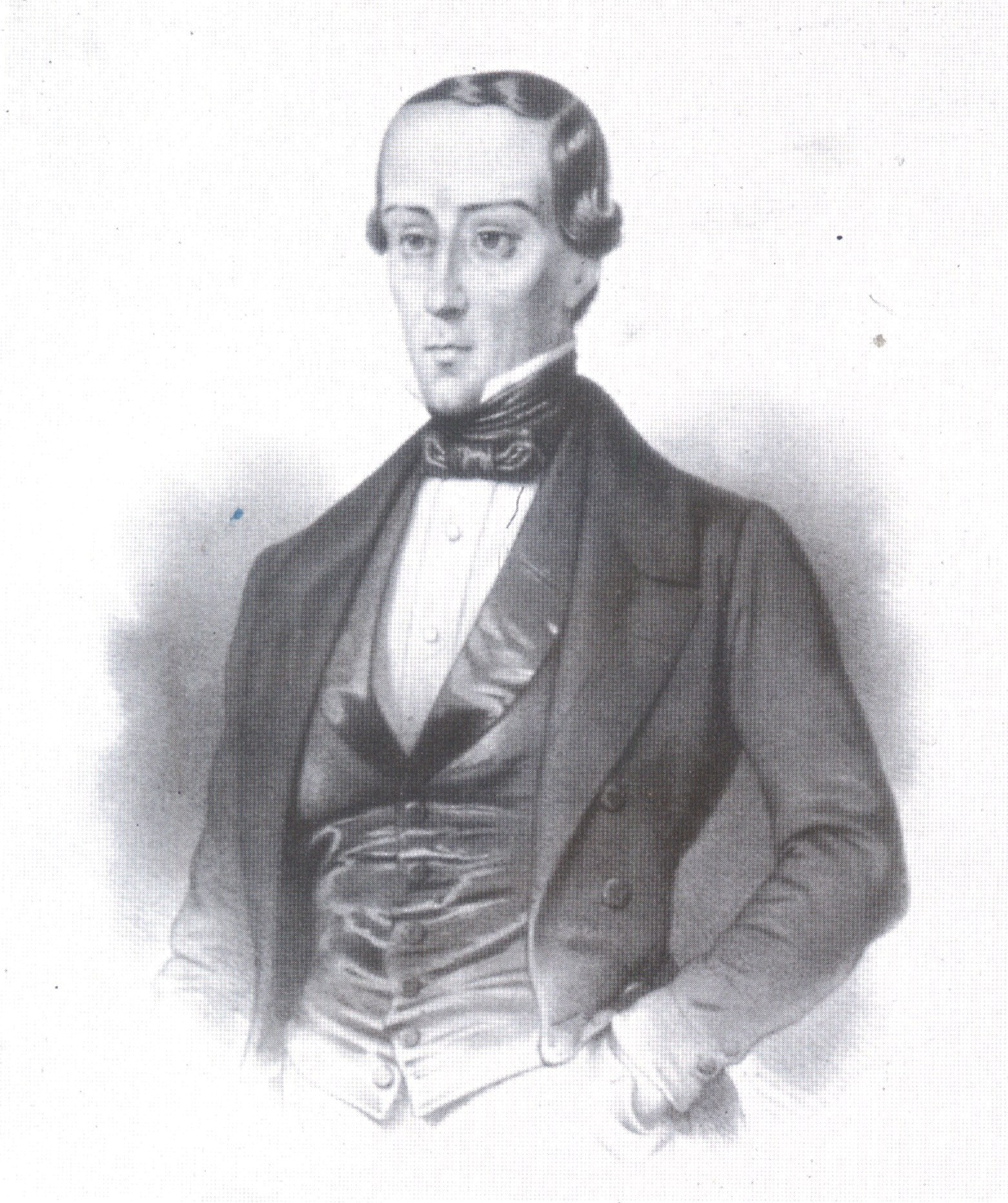 Grabado de Lemercier sobre un dibujo de José María Espinoza